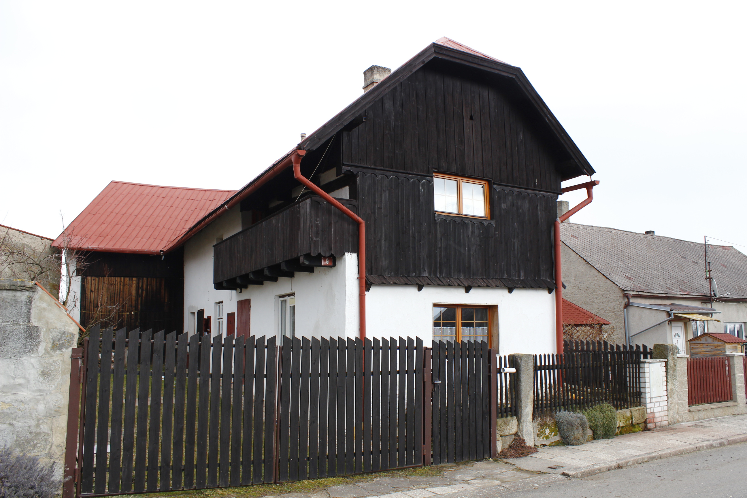 Dům číslo popisné 6 v Kováni.